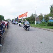 День Победы